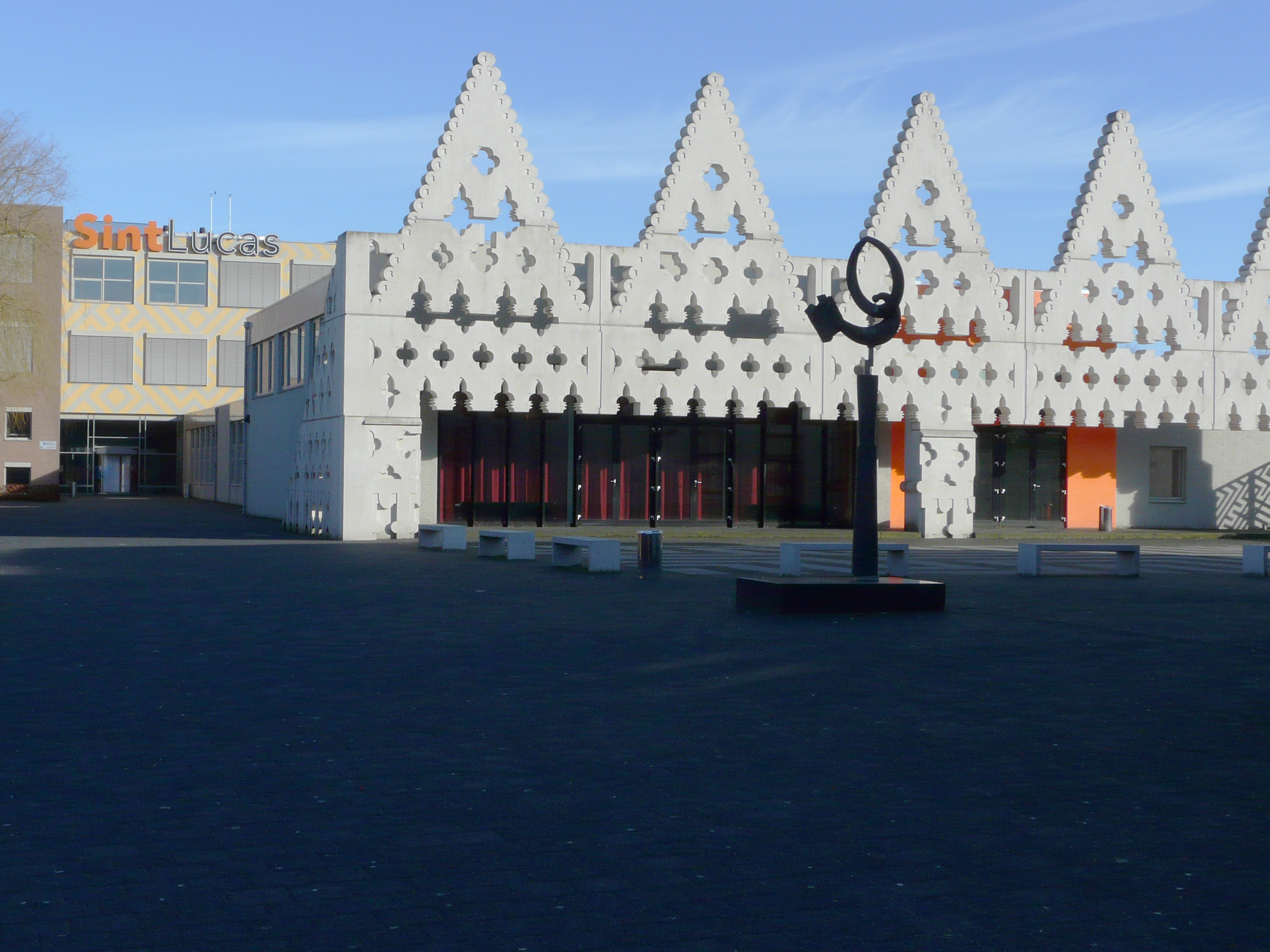 Sint Lucas College in Boxtel